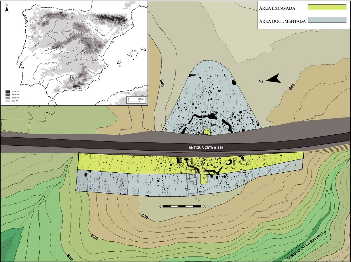 Situación del poblado calcolítico “Venta del Rapa” (Mancha Real, Jaén) en la Península Ibérica; topografía y planta general del foso y las estructuras negativas domésticas y funerarias, dividida por la antigua carretera A-316.